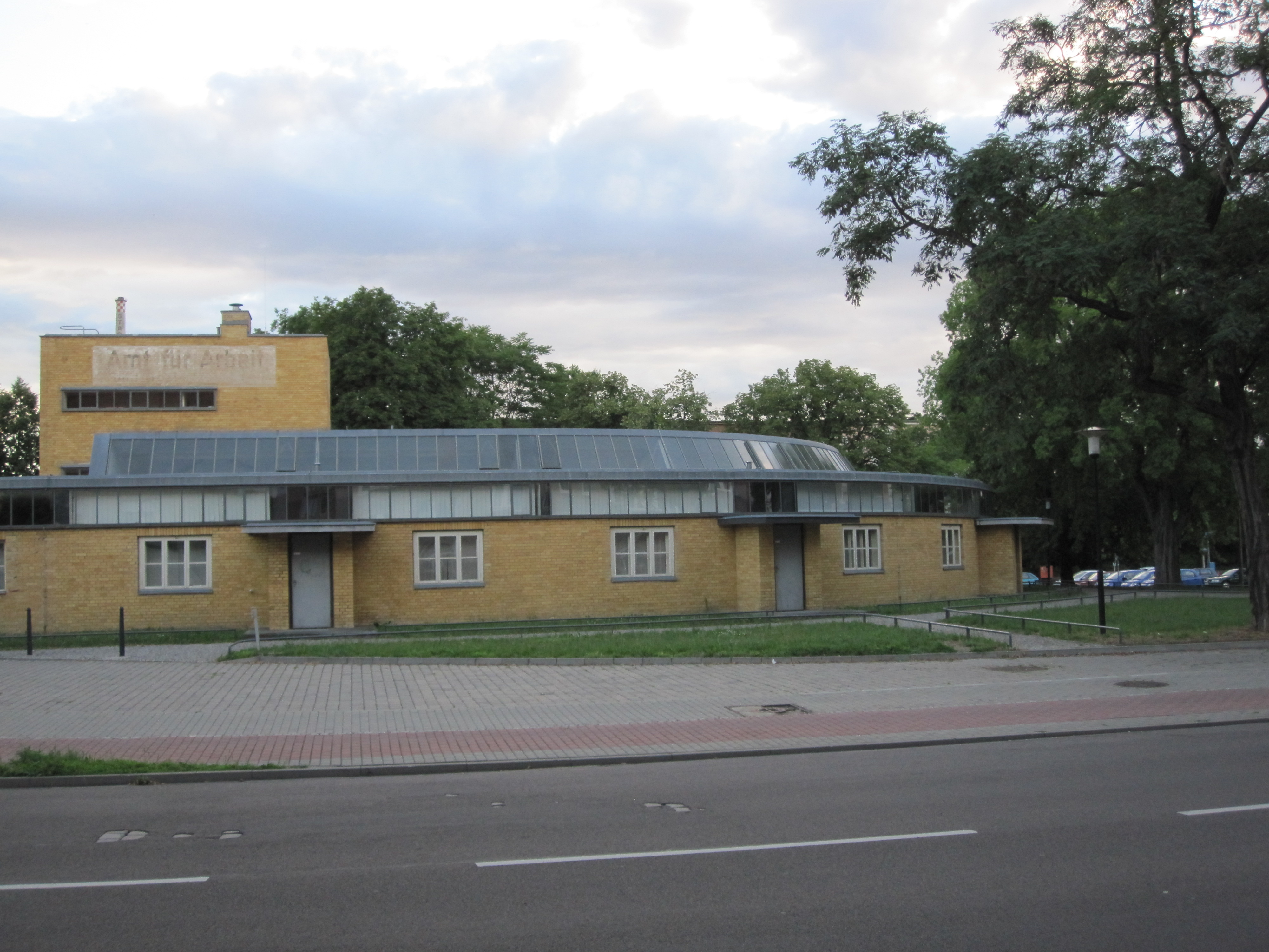 Arbeitsamt von Walter Gropius; erbaut 1928–29